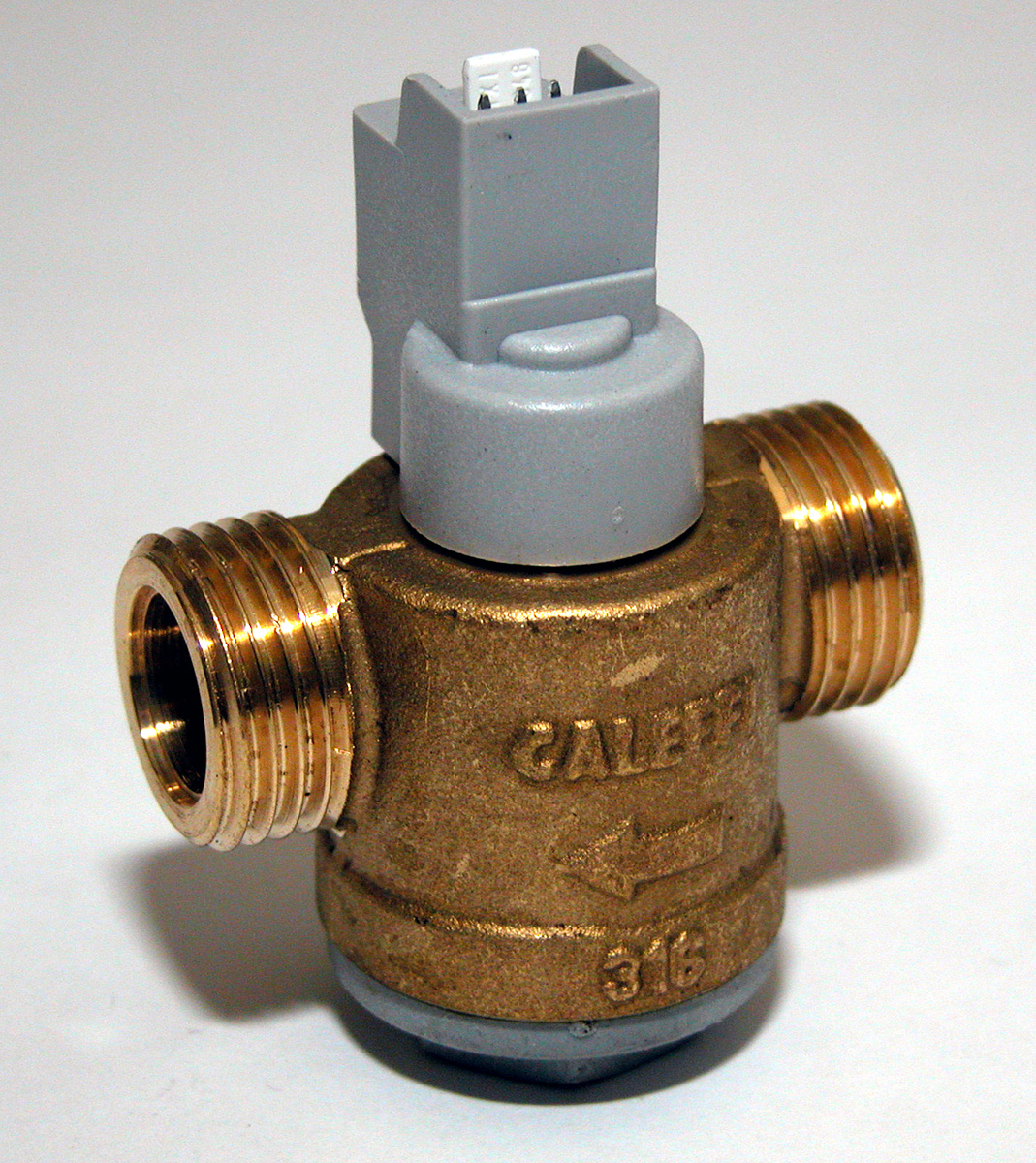 Caudalímetro electrónico de molino